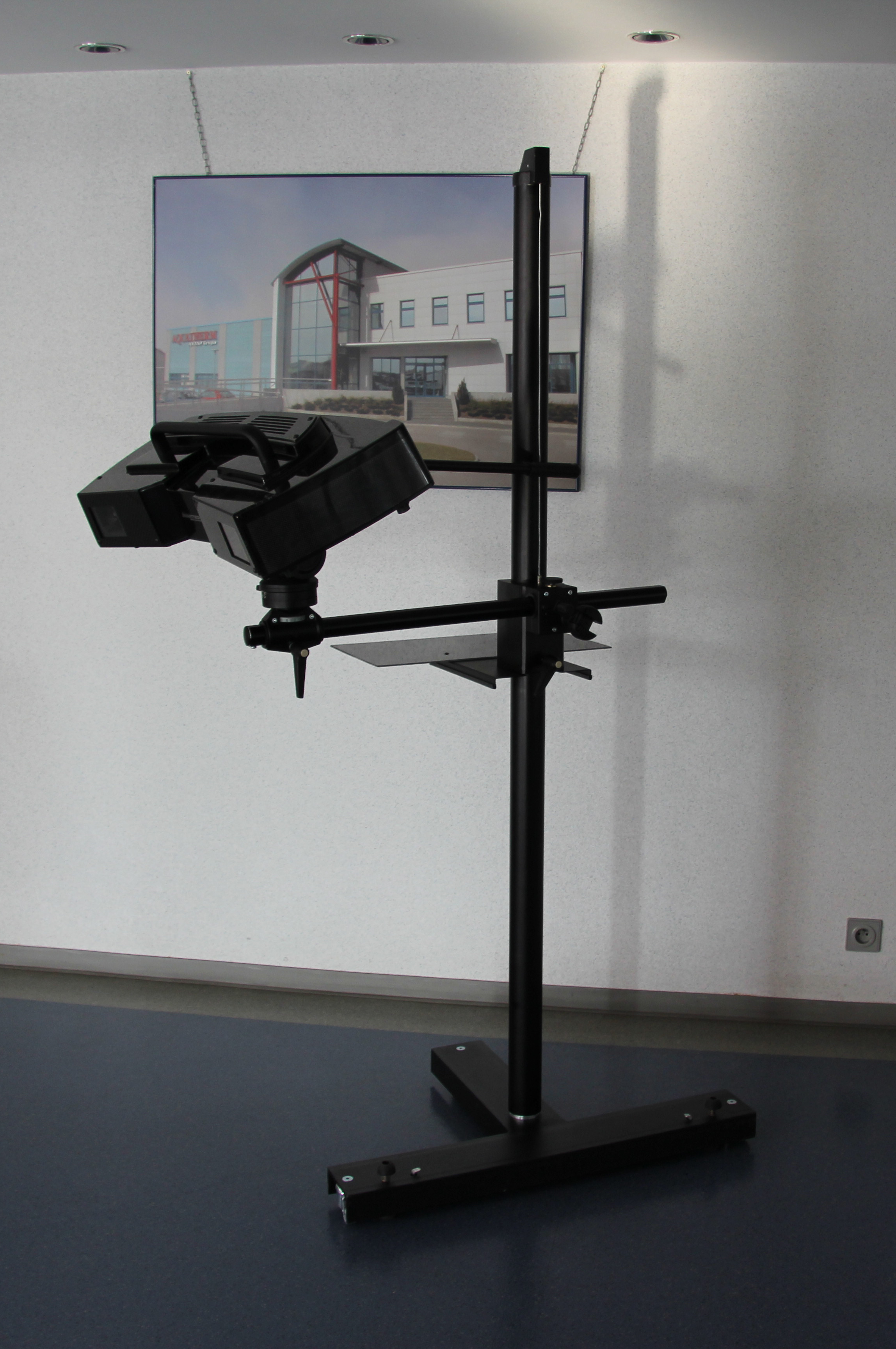 Skaner 3D w technologii światła strukturalnego, używający projektora i detektora prążków wyświetlanych na badanym obiekcie.